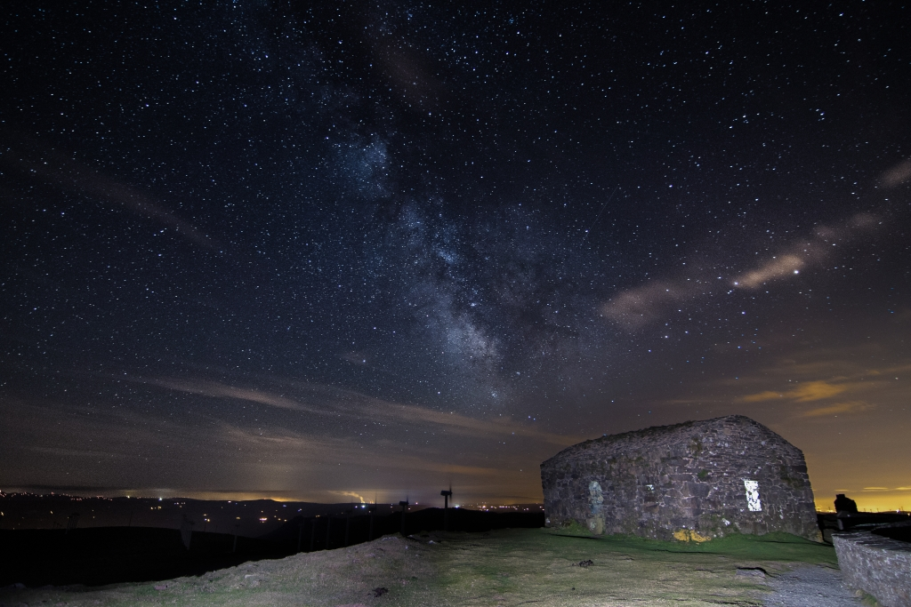 Foto nocturna de la garita de Herbeira LIC Costa artabra